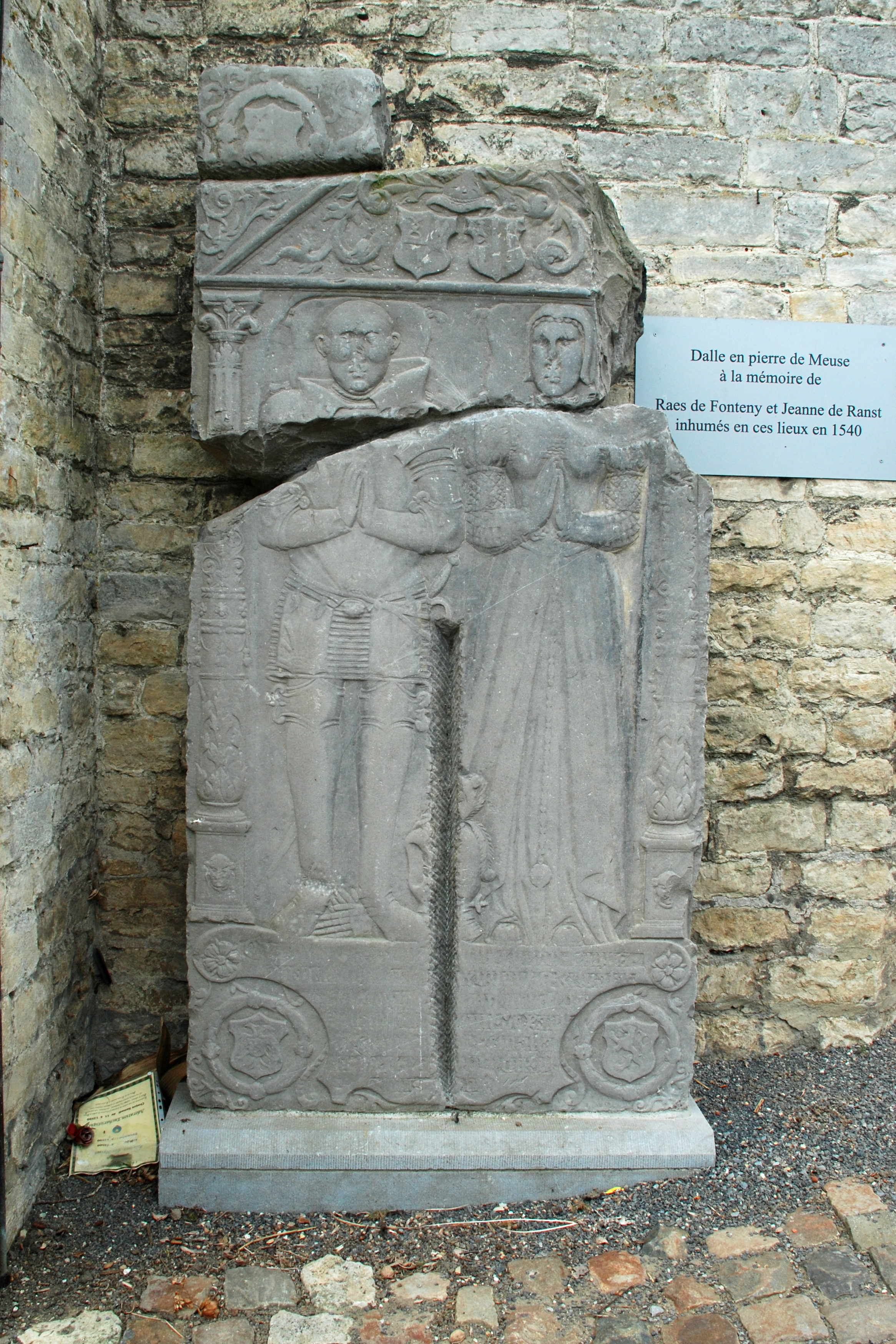 Belgique - Brabant wallon - Jodoigne - Saint-Remy-Geest - Église Saint-Remy